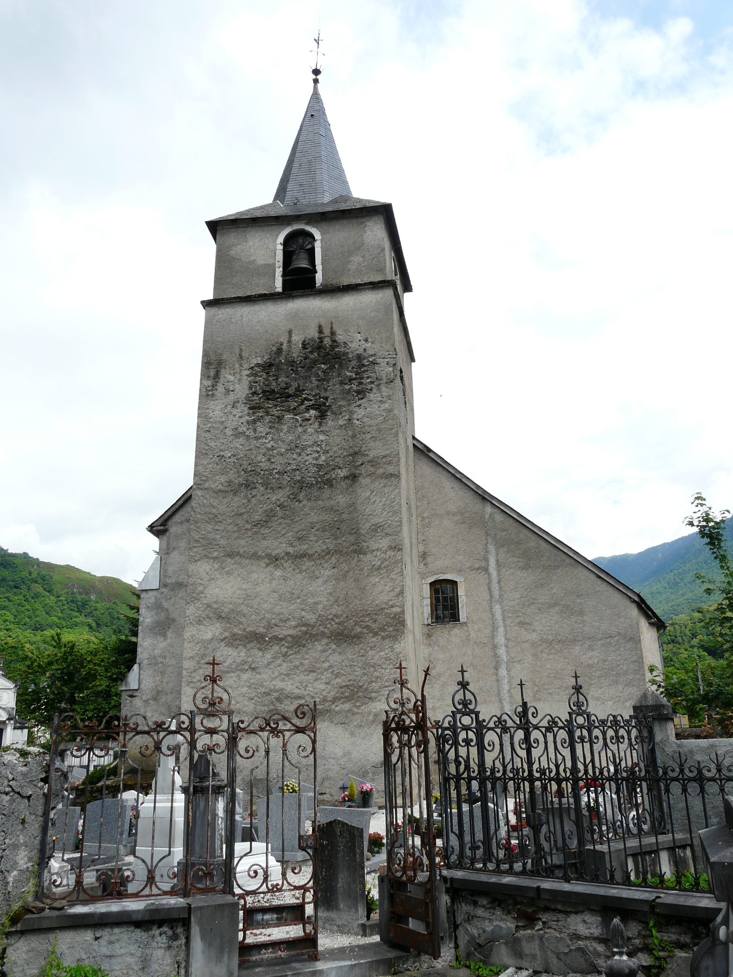 L'église de Fos vue depuis l'ouest, Haute-Garonne, France.